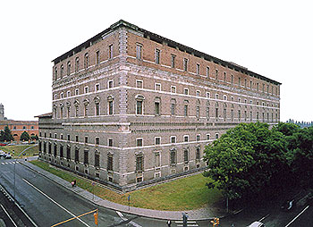 foto esterna di Palazzo Farnese a Piacenza